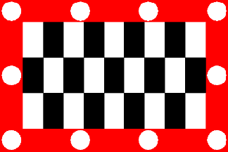 Vlag van de voormalige Drentse gemeente Nijeveen